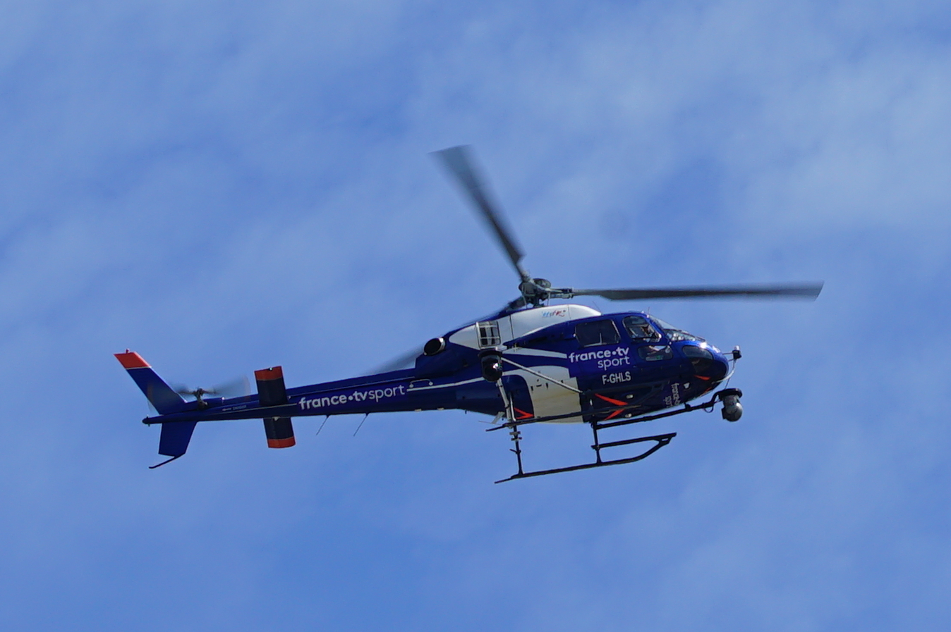 avant le départ de l'étape à Reims.